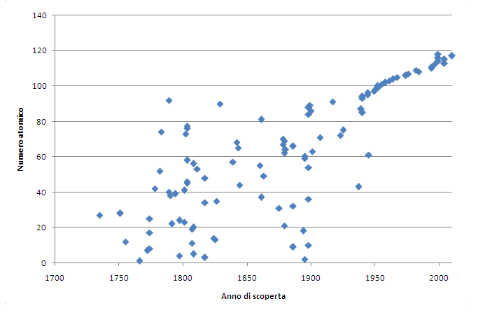 Anno di scoperta degli elementi chimici e loro numero atomico. Non sono visualizzati gli elementi chimici scoperti prima del 1700 o dopo il 2010.